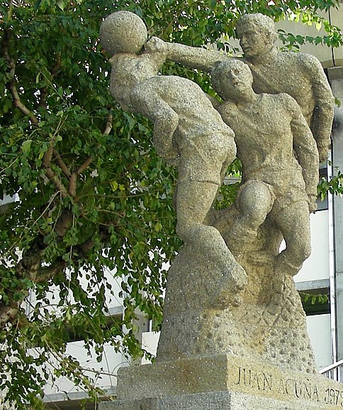 Juan Acuña, A Coruña Escultura dedicada al portero Juan Acuña en las inmediaciones del Estadio de Riazor. Fue cuatro veces el portero menos batido de primera division (Trofeo Zamora) 41/42 - 42/43 - 49/50 - 50/51. Y 20 años como jugador deportivista.